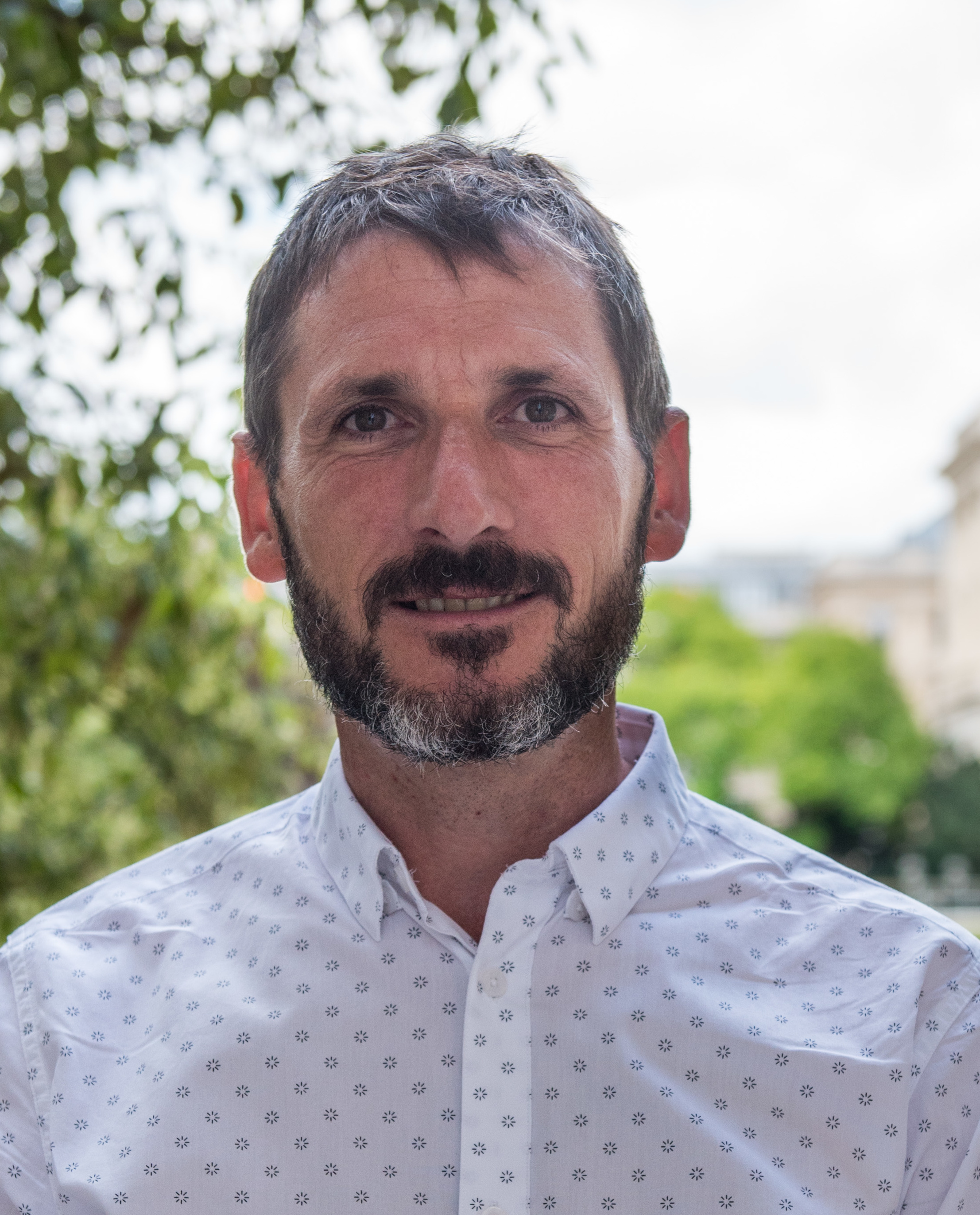 Matthieu Orphelin dans le jardin des Quatre colonnes du palais Bourbon en 2017.